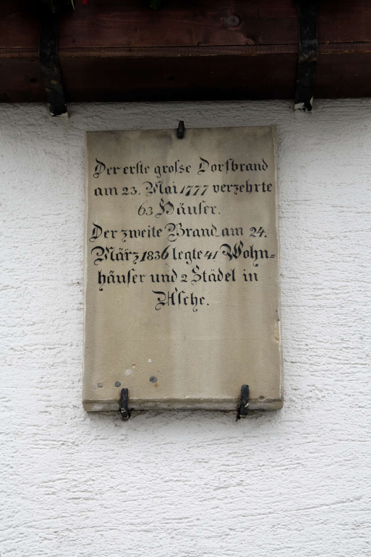 Unterammergau, denkmalgeschützte Gedenktafel an die Ortsbrände 1777 und 1836 in der Dorfstraße 2